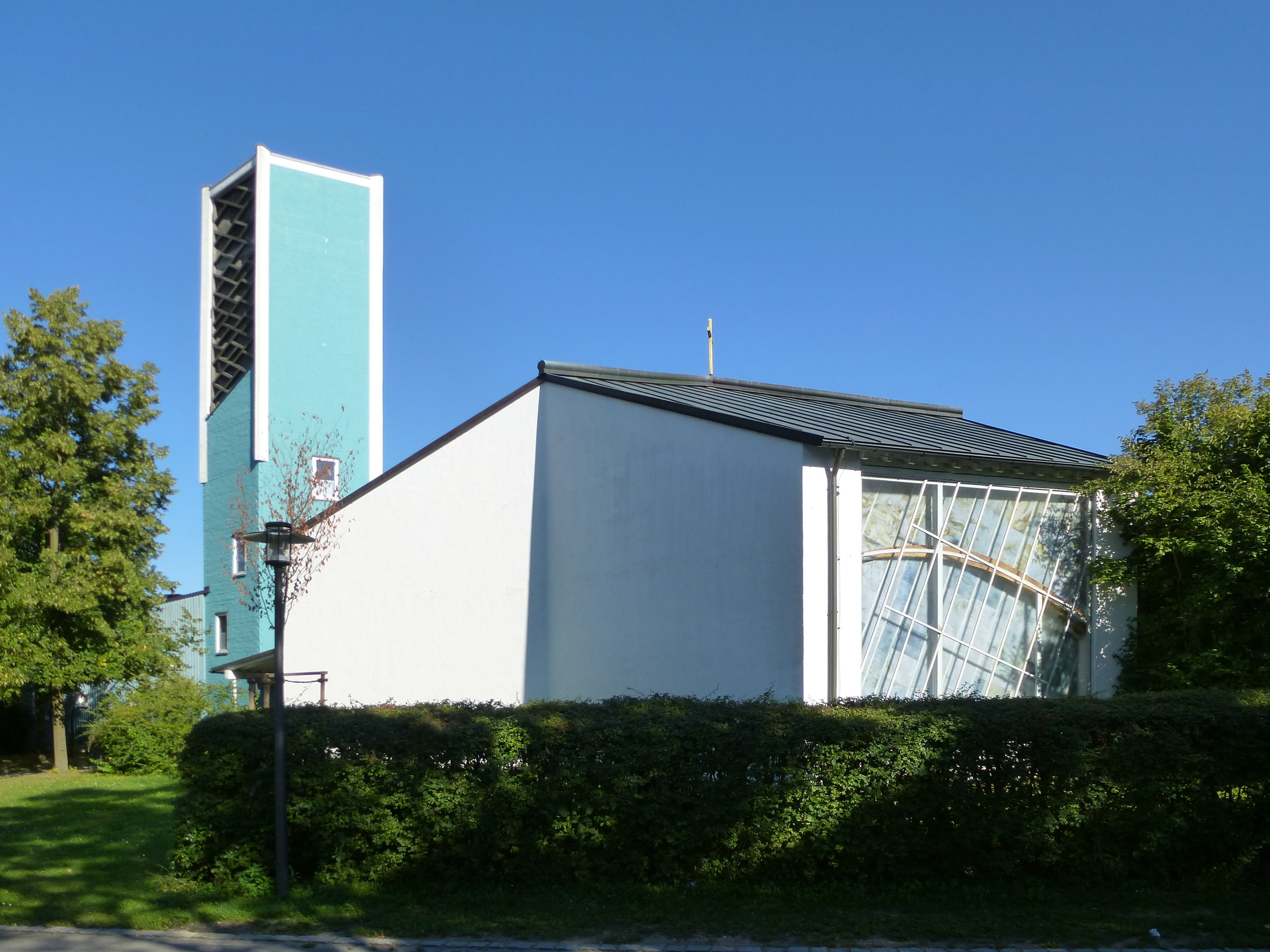 Evang.-Luth. Lutherkirche in Neutraubling